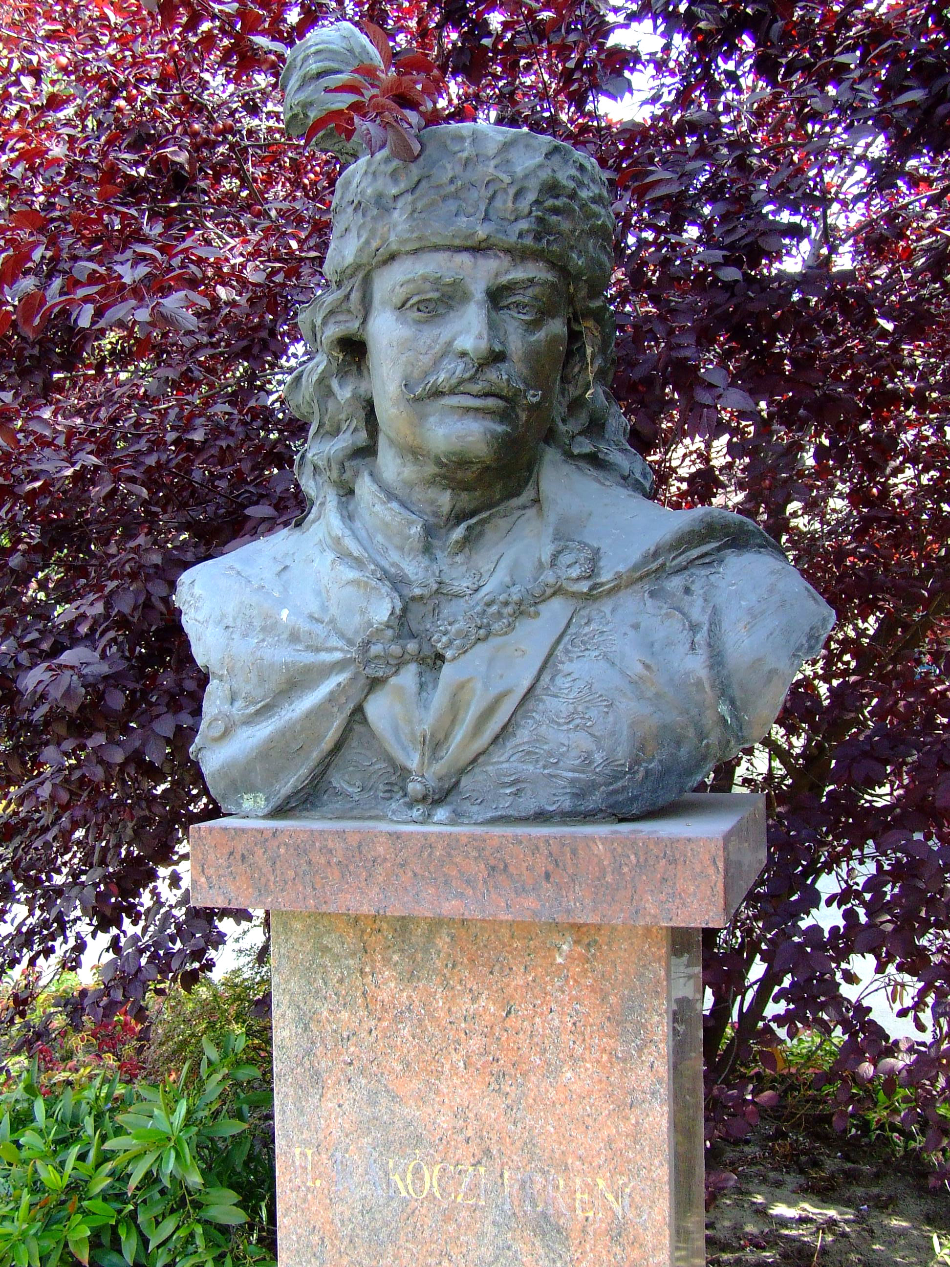 II. Rákóczi Ferenc szobra Kiskőrösön, a Petőfi Sándor téren. Máté István alkotása (2003) Forrás:[1]